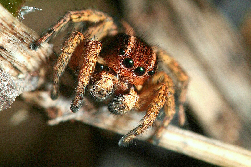 Phlegra fasciata jumping spider